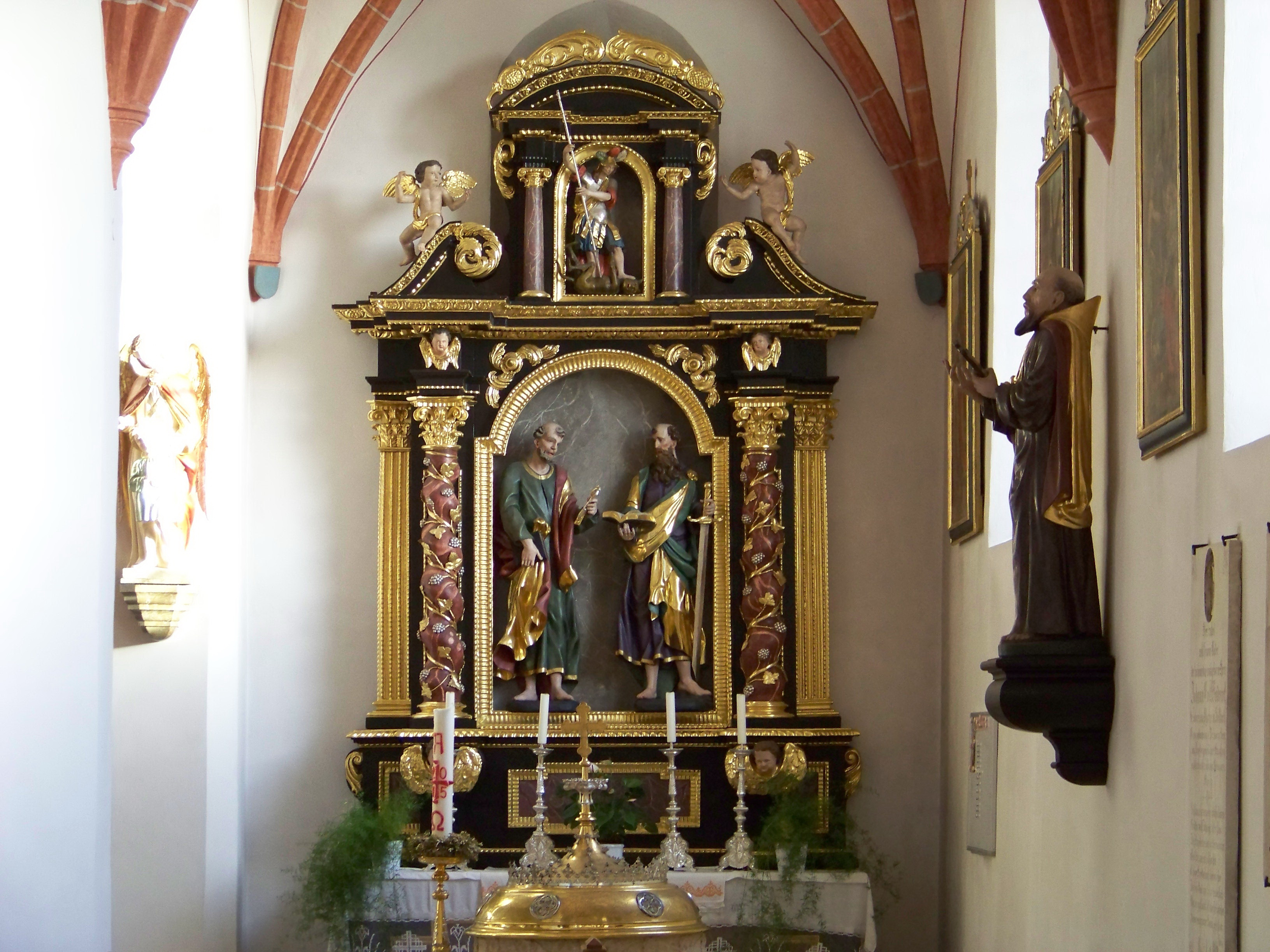 Obersüßbach, Kirchgasse 7, Katholische Pfarrkirche St. Jakobus der Ältere. im Kern romanische Chorturmanlage, spätgotisch verändert, 1877/80 neugotisch erweitert durch Verlängerung nach Westen und Anbau der Seitenschiffe. Altar im südlichen Seitenschiff mit den Figuren St. Petrus und St. Paulus. Im Auszug kleine Figur mit St. Georg zwischen engelbesetzten Voluten. Das innere Säulenpaar im Barockstil, das äußere bereits klassizistisch.